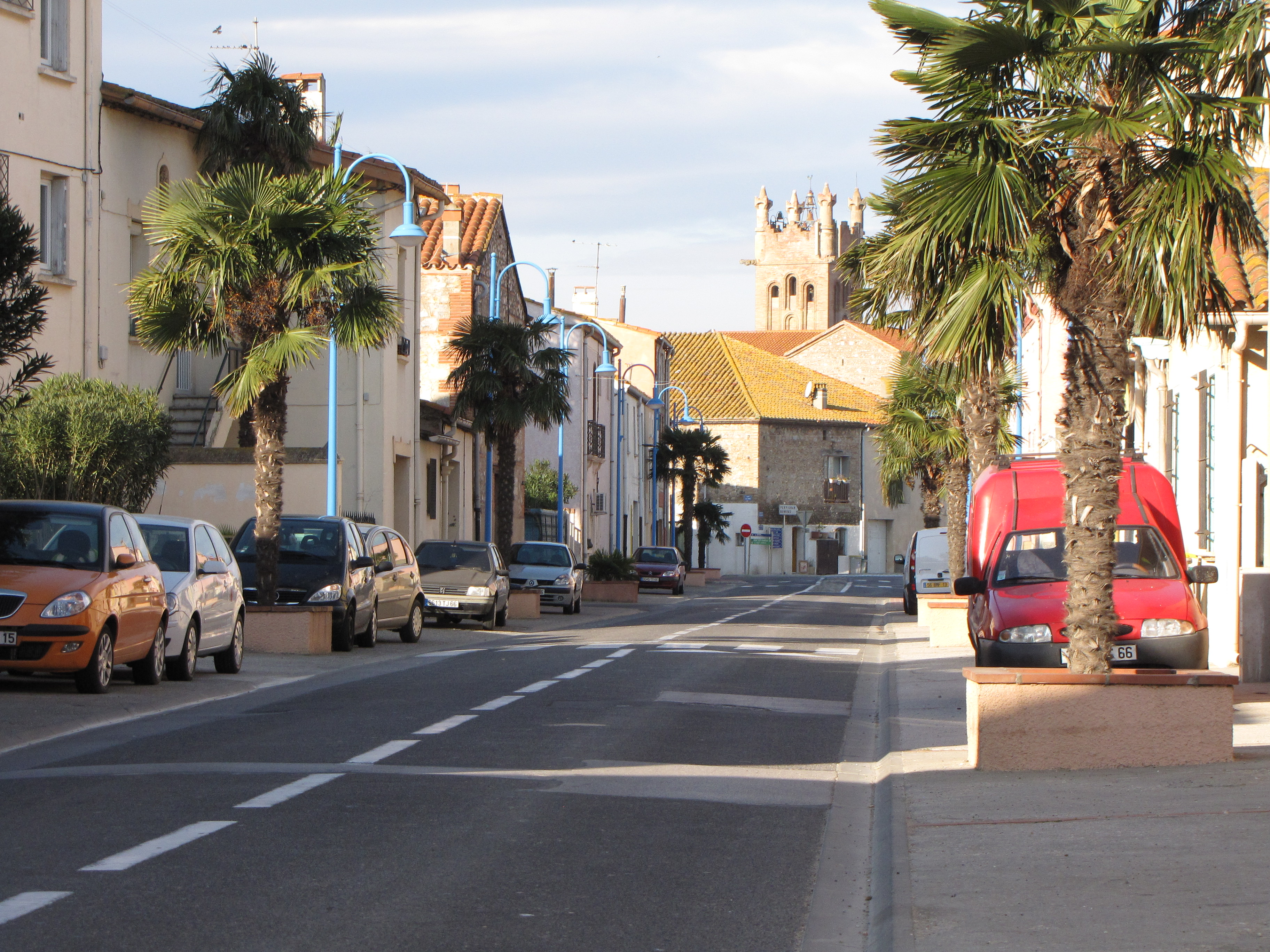 Villelongue-de-la-Salanque